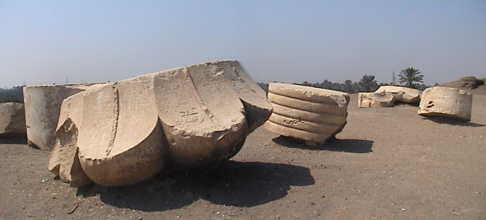 Vue générale des vestiges de la salle hypostyle ou de la cour péristyle du palais d'Apriès à Memphis - XXVIe dynastie